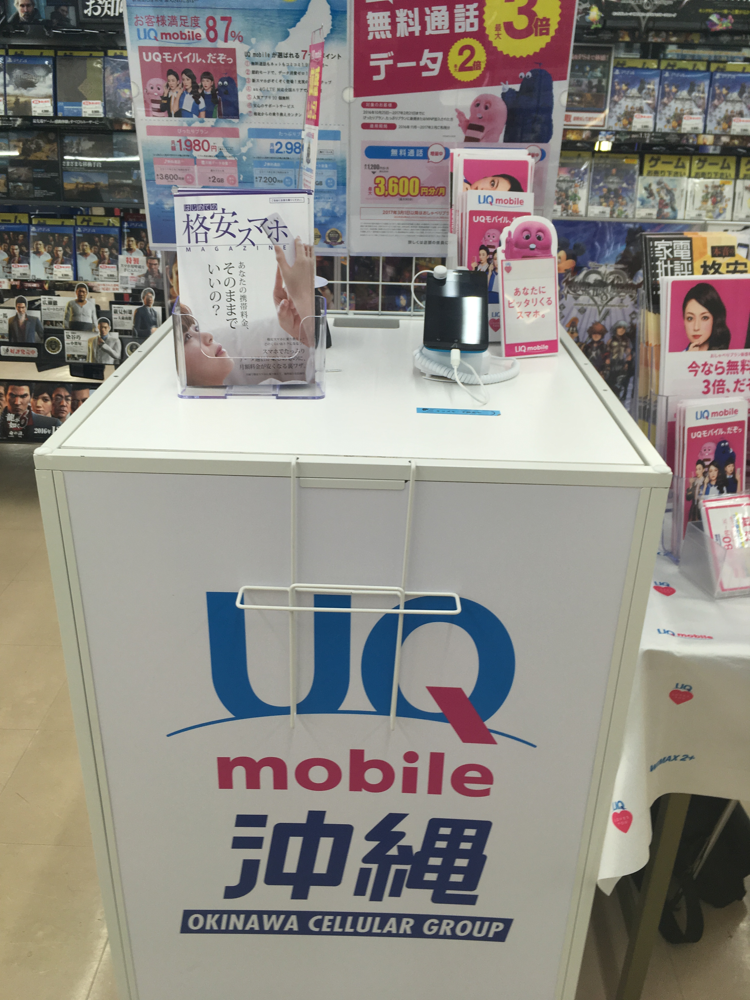 UQモバイル 展示スペース